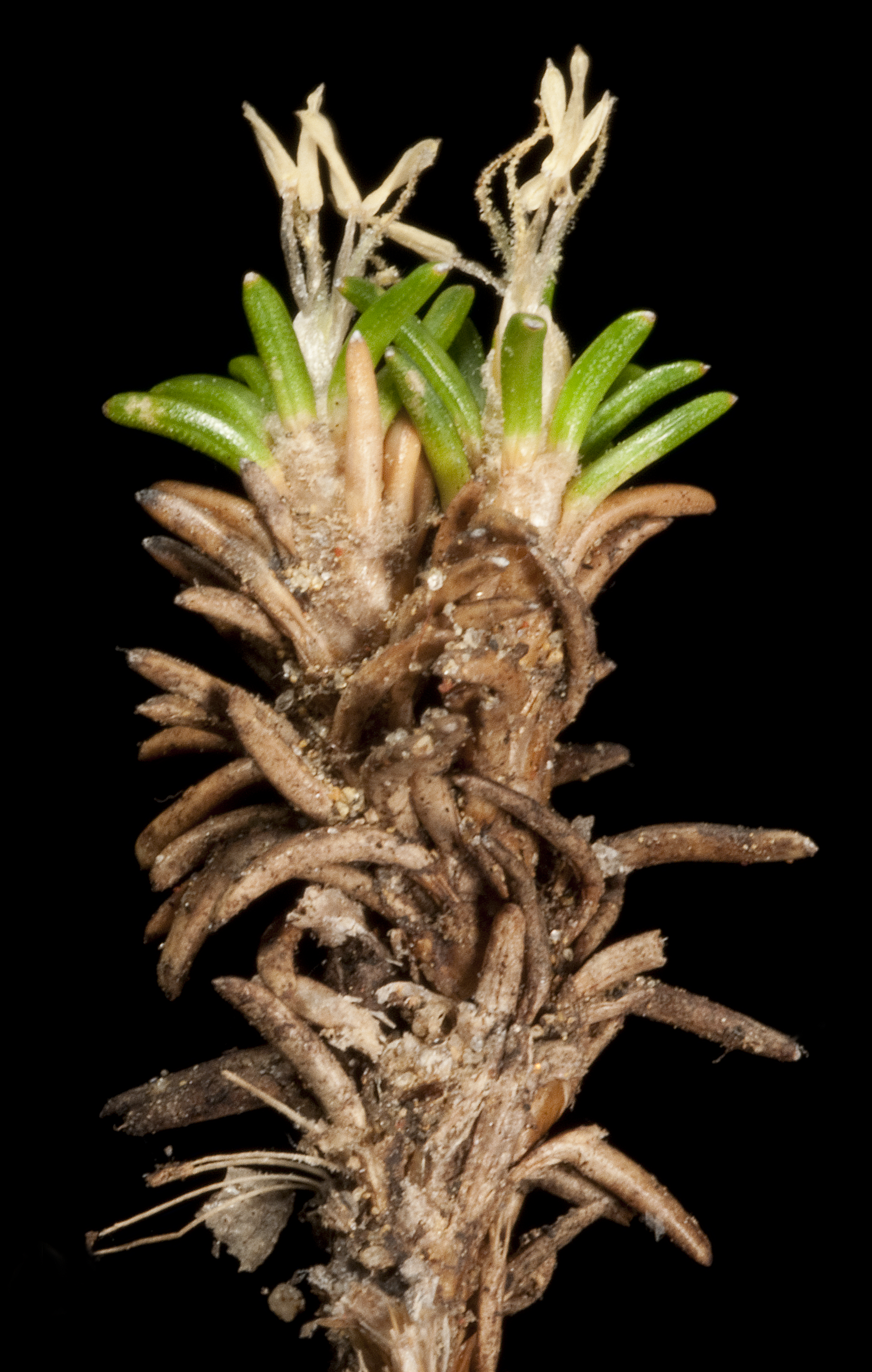 KRT4483 Western Australian Herbarium